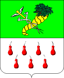 Герб Краснокутська: Герб Краснокутська російського періоду затверджений 21 вересня 1781р. У горішній частині перетятого щита герб Харківський; у долішній - в срібному полі сім черешень, що означали великий достаток цих плодів.